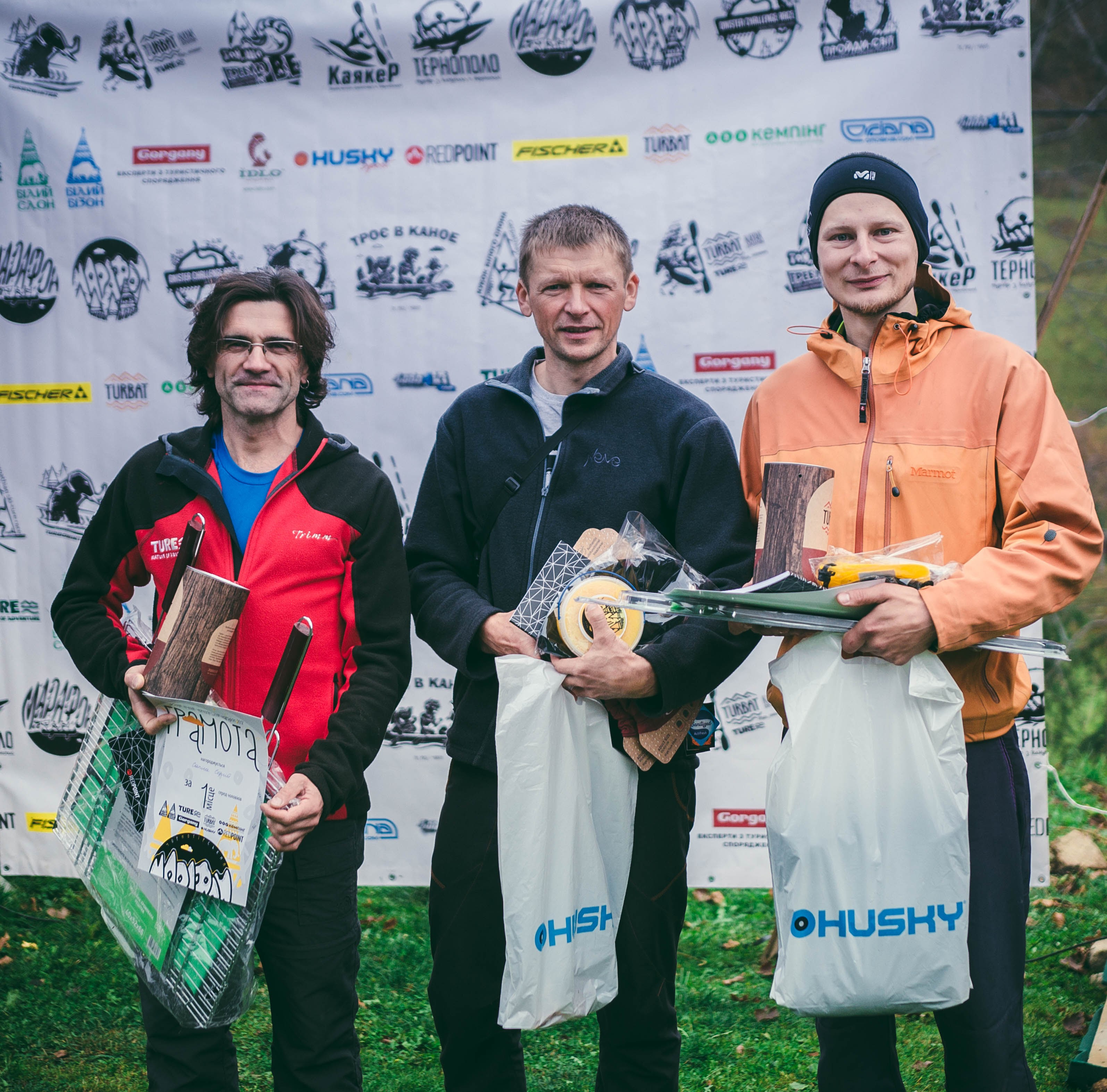 Переможці Нічного чорногірського марафону 2017 (осінь) у категорії "Чоловіки". Зліва направо: Сергій Сапіга (І місце), Бідюк Віталій (ІІ-ІІІ місце), Гром'як Олександр (ІІ-ІІІ місце).